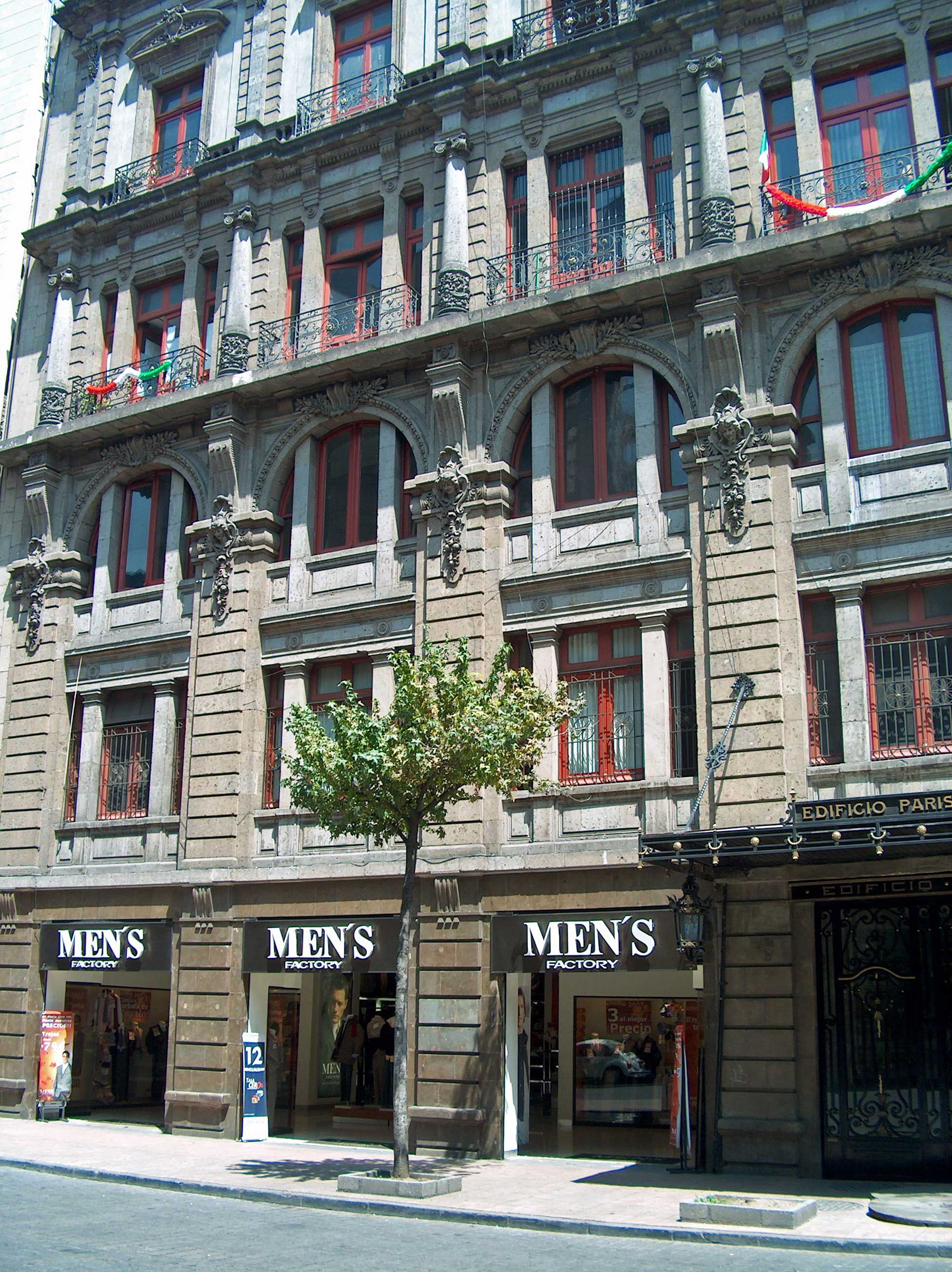 edificio paris